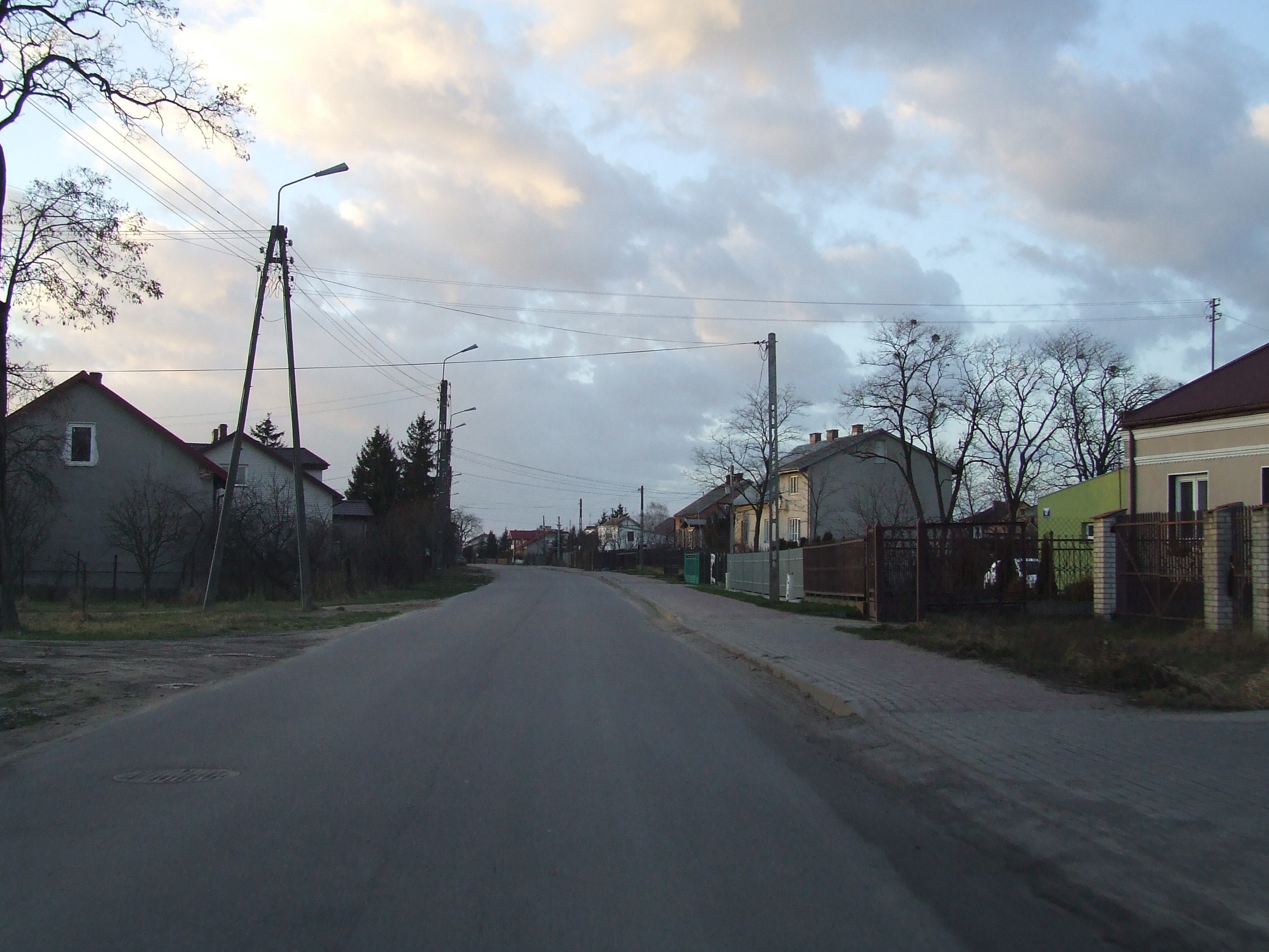 Cząstków Polski (po lewej), gm. Czosnów